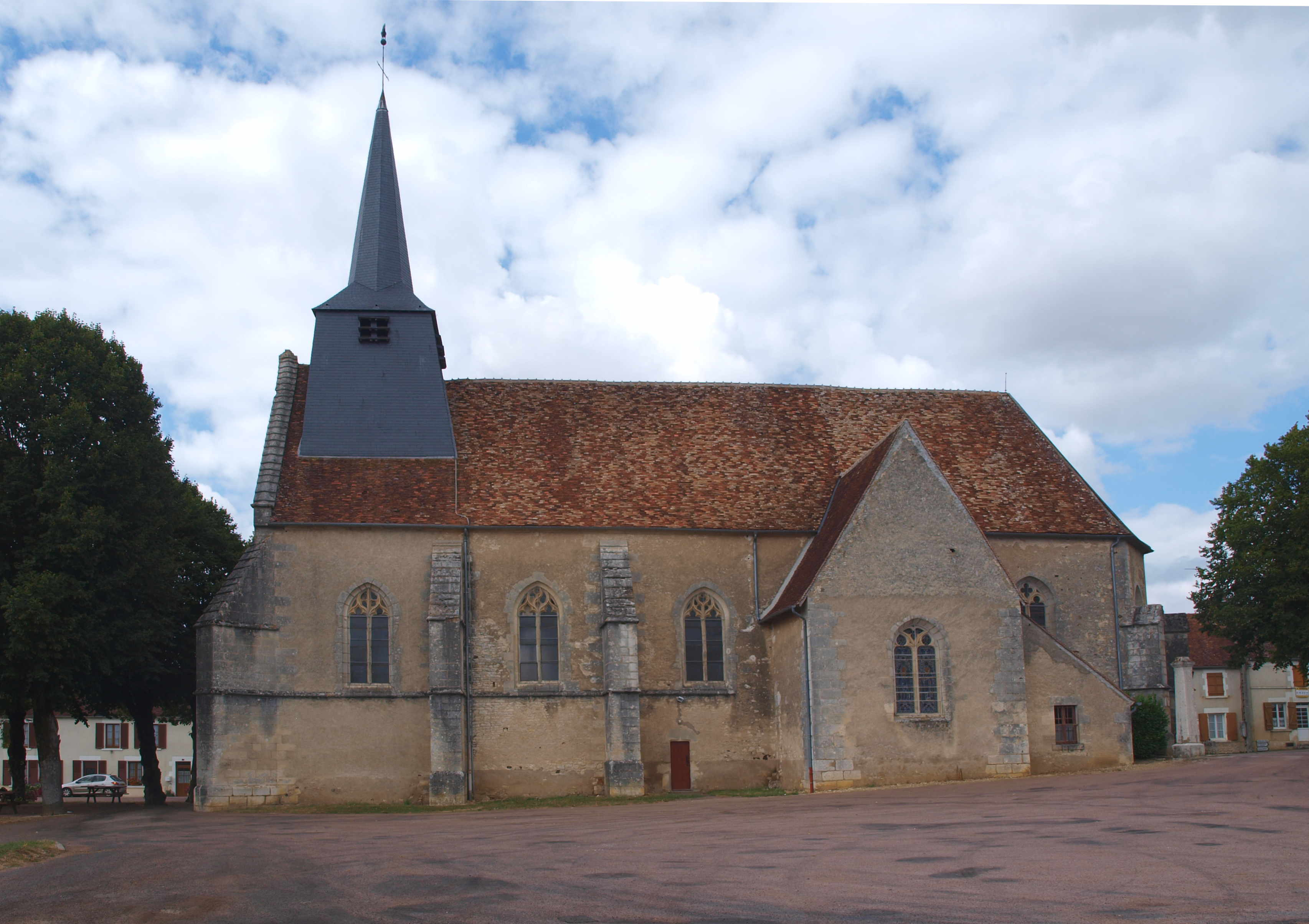 Ciez (Nièvre, France) , l'église.